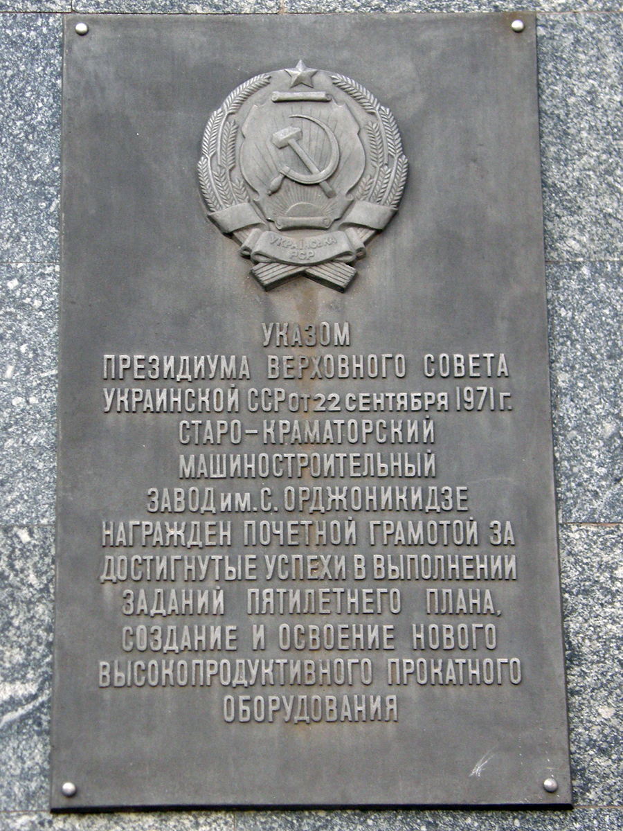 Мемориальная доска о награждении СКМЗ почётной грамотой Верховного Совета Украины